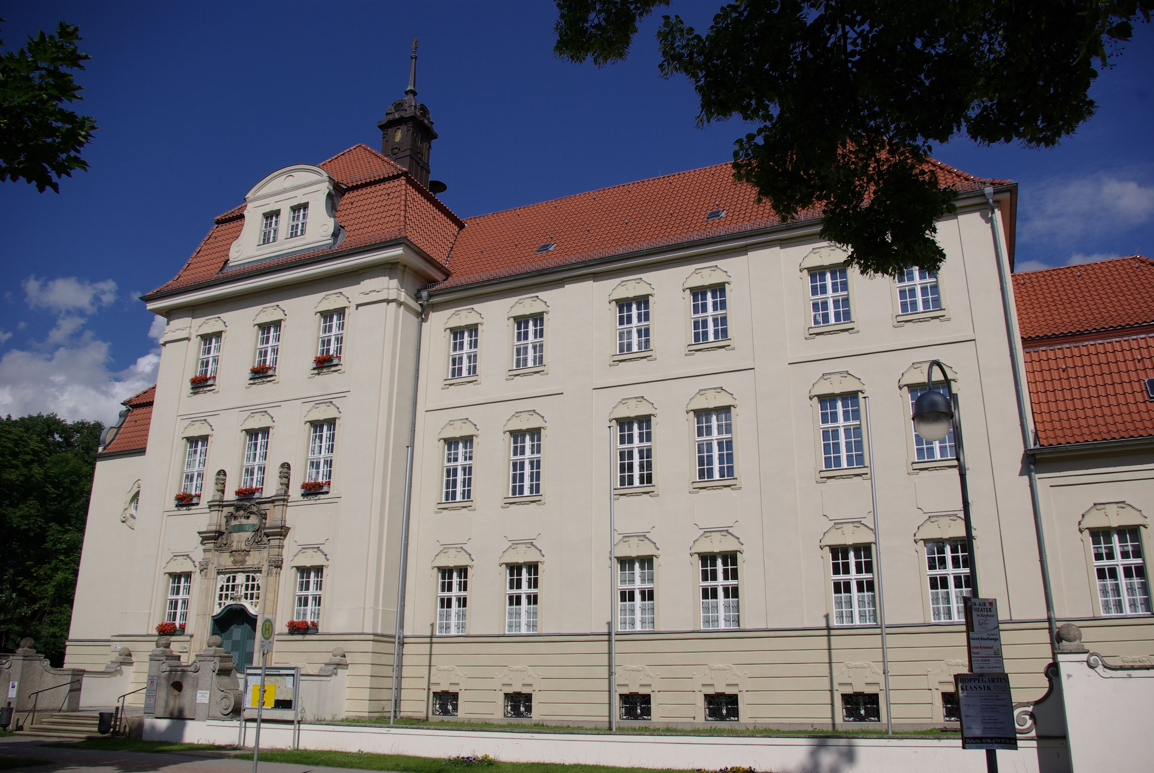 Altlandsberg in Brandenburg. Das heutige Rathaus war mal das Amtsgericht. Das Gebäude steht unter Denkmalschutz.